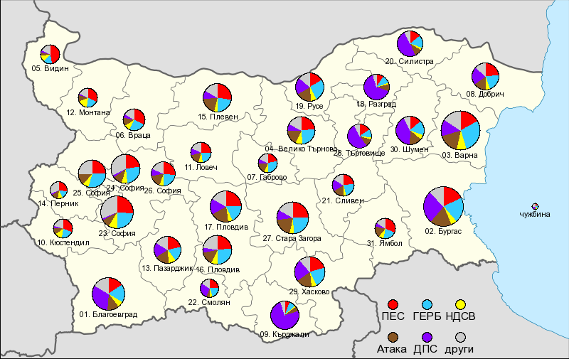 Избори за Европейски парламент в България през 2007: подадени гласове по район